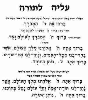 Aliá La Torá - Oração para a leitura da Torá